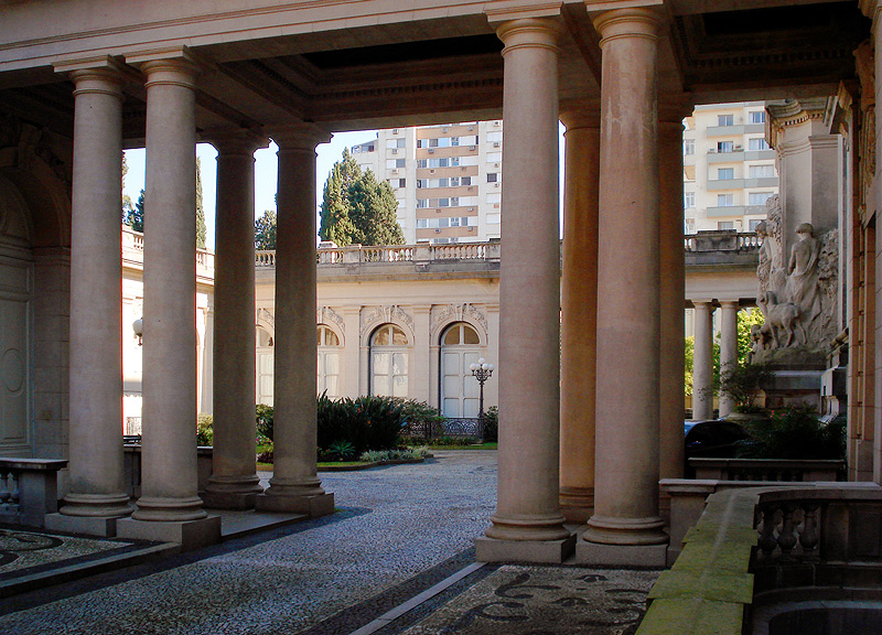 Palácio Piratini, Porto Alegre, Brasil. Detalhe dos jardins internos